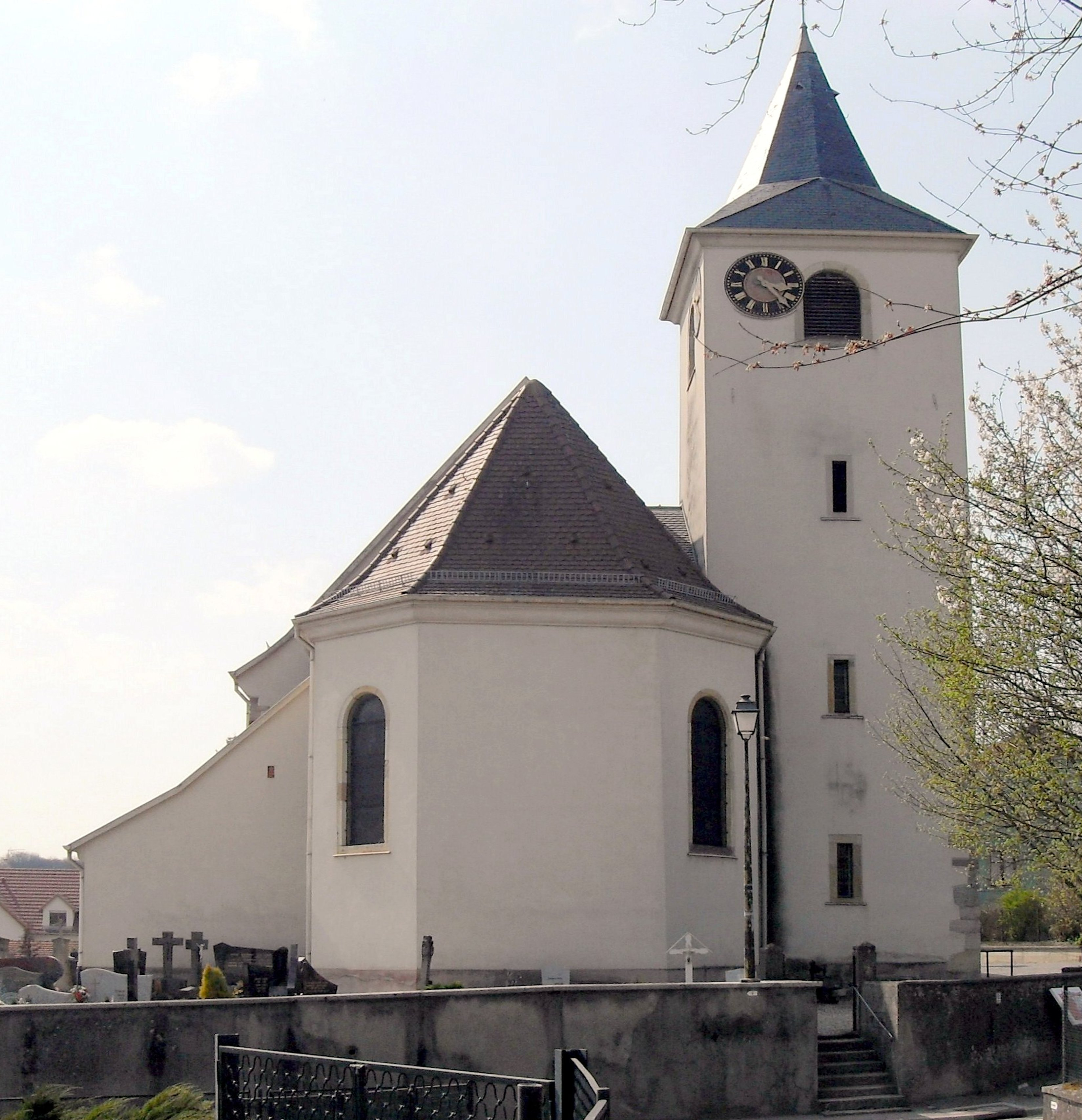 L'èglise Saint-Léger à Steinbrunn-le-Bas